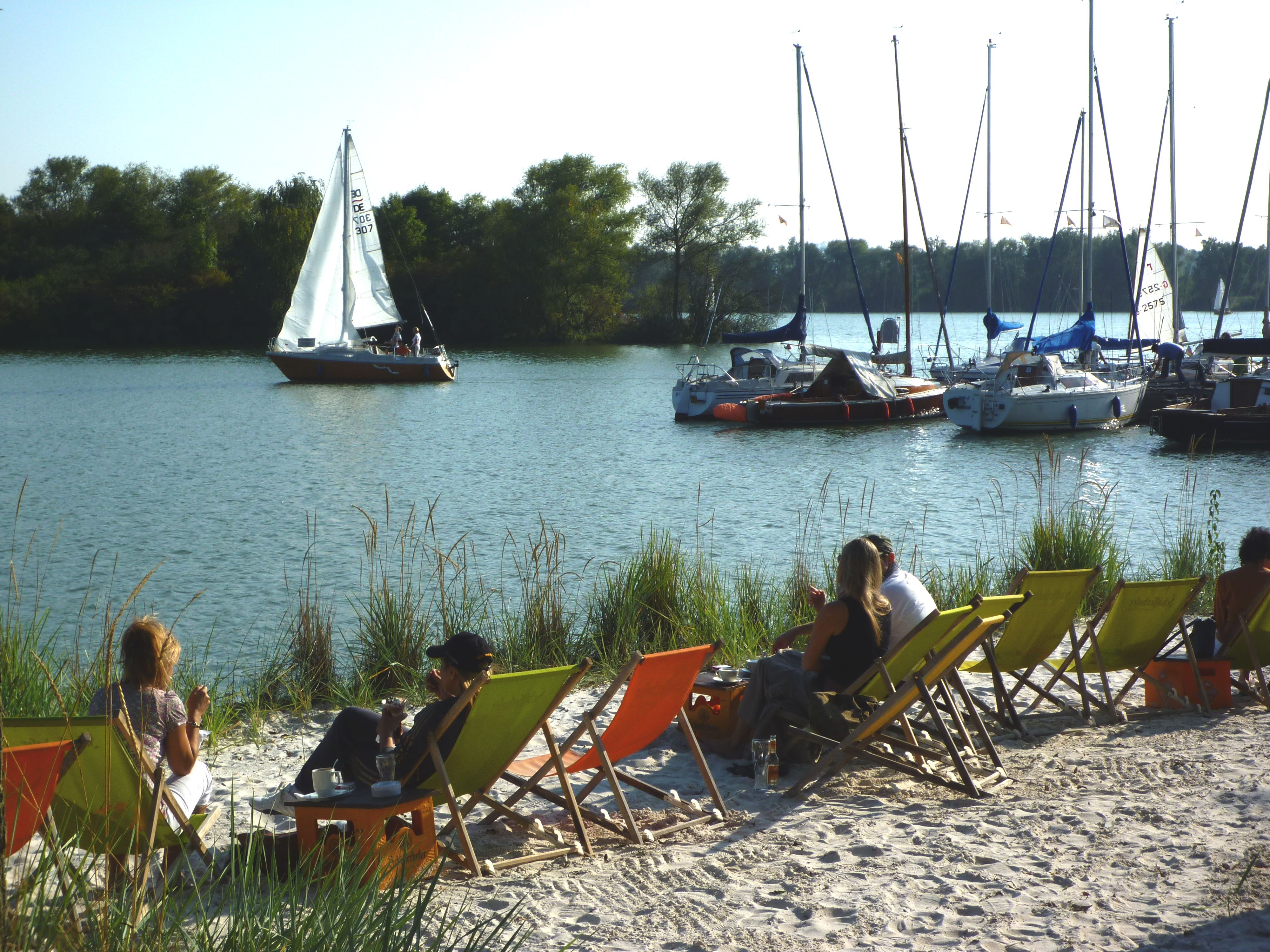 Northeim - Segelrevier Seenplatte